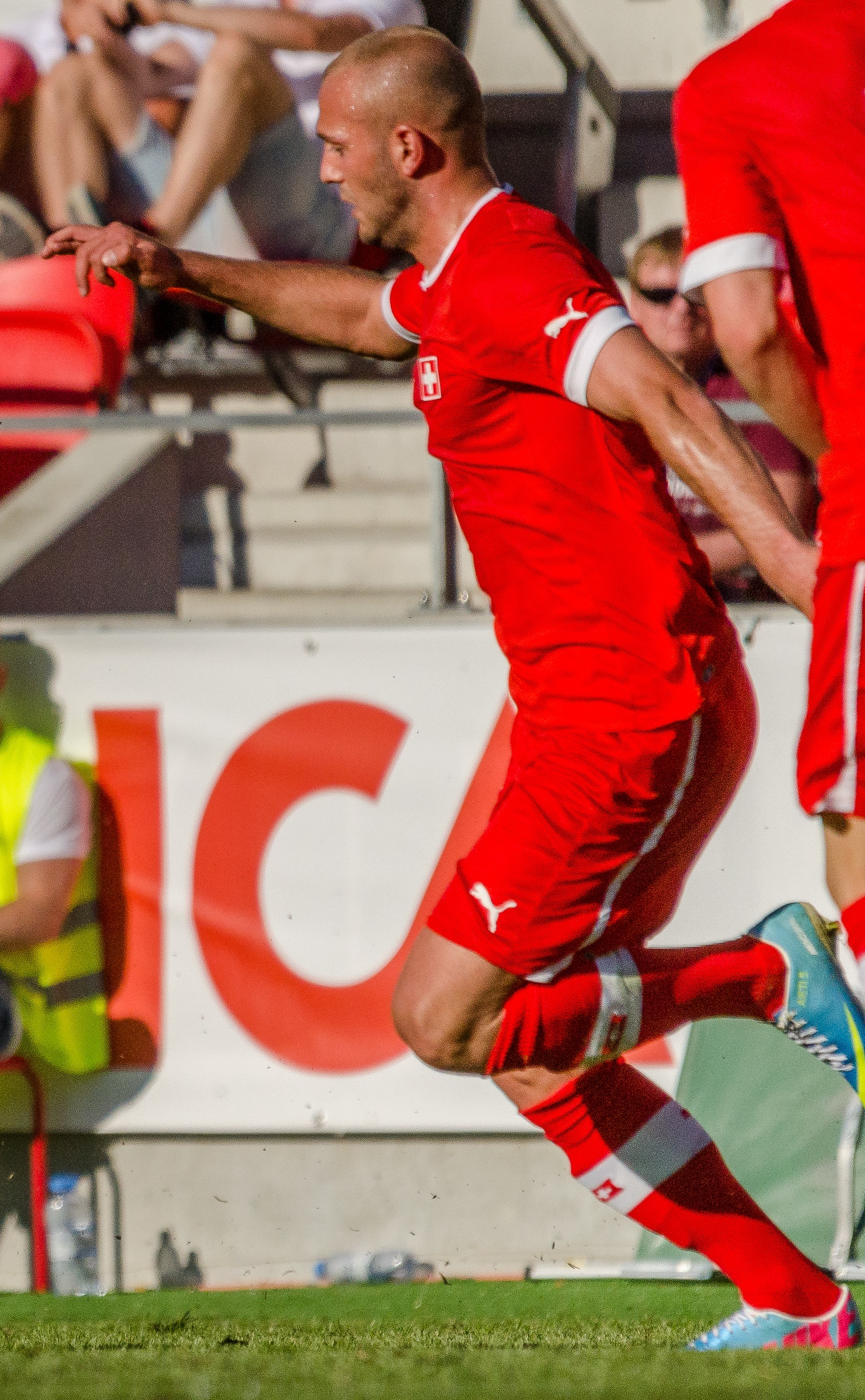 Swiss footballer Arlind Ajeti in the Swiss Under-21 national team's 3-2 defeat to Sweden at Myresjöhus Arena in Växjö, June 6 2013.